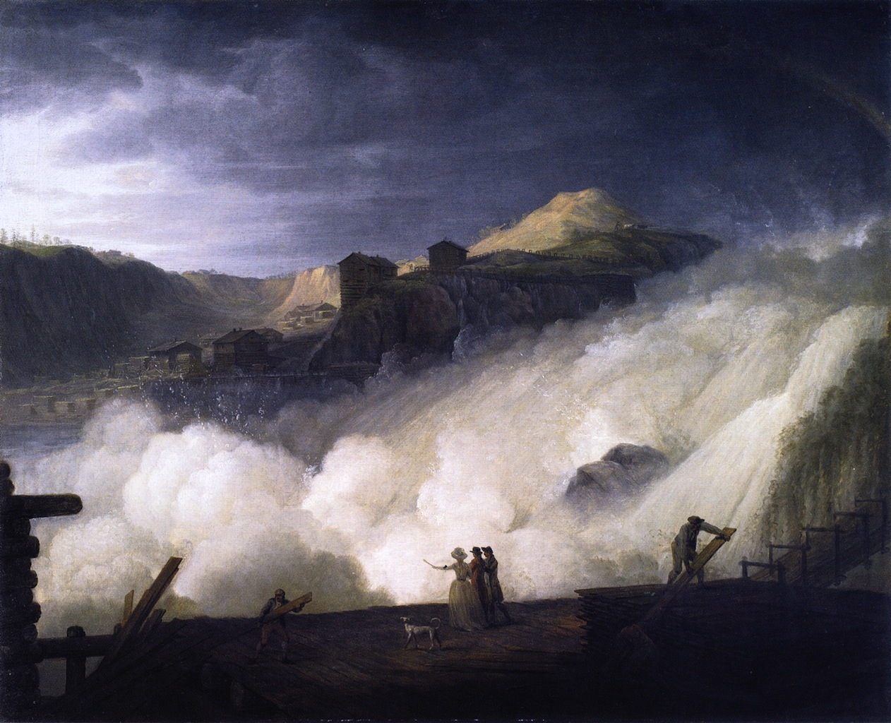 Sarpsfossen, (Wasserfall in Südnorwegen)